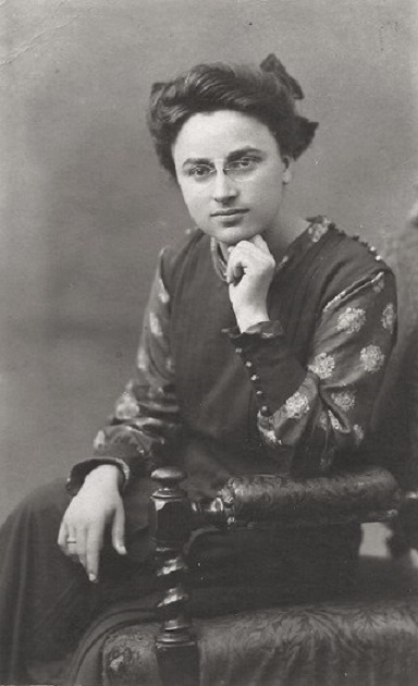 Pierina Boranga